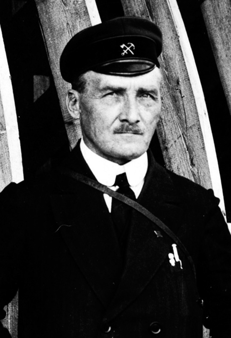 Genrikh Graftio (1869-1949)